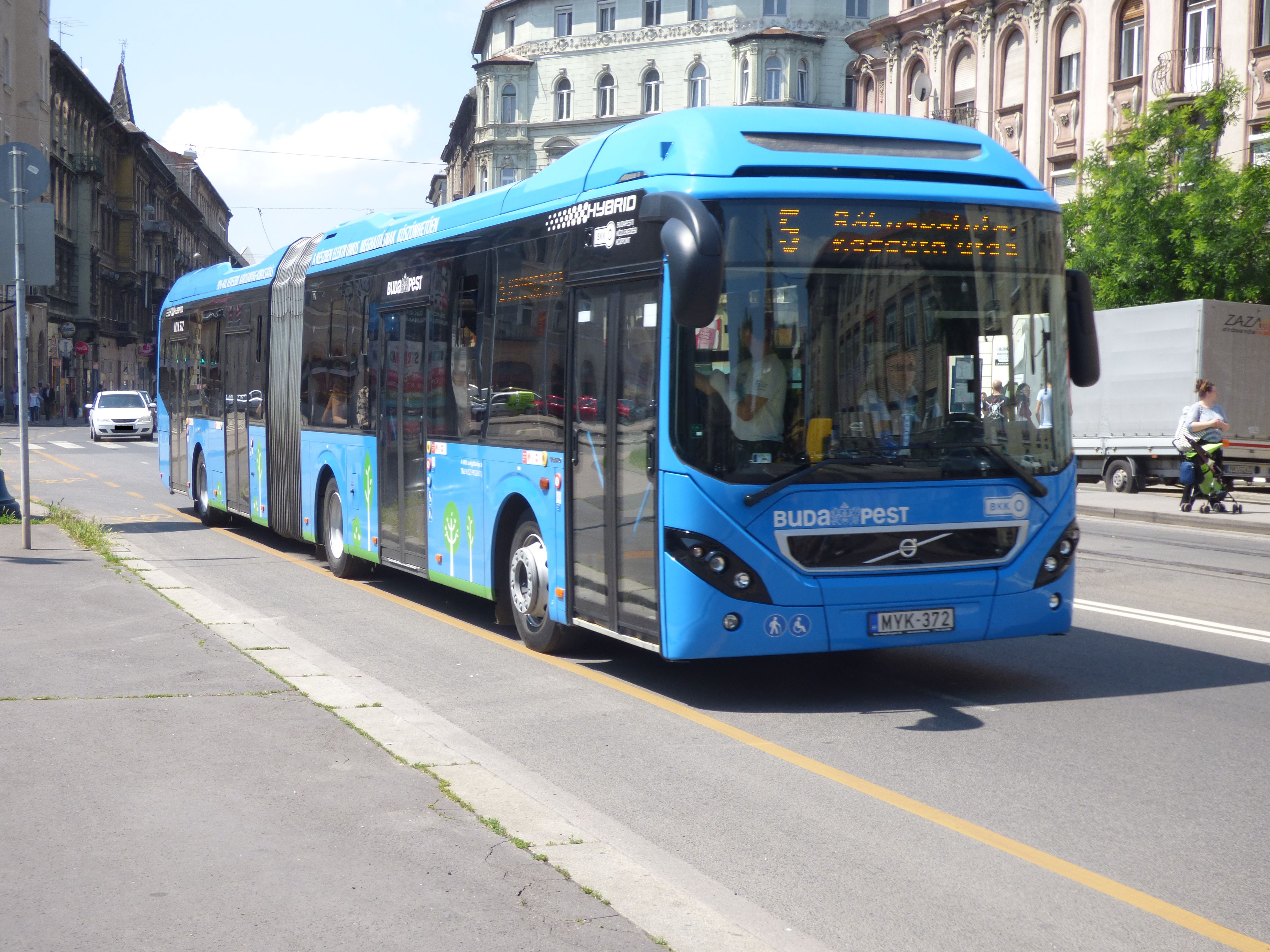 Volvo 7900A busz az 5-ös vonalon (frsz. MYK-372)